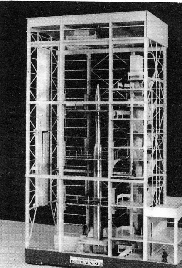 Tour portique construite par Bordeaux Sud ː à 18 m du hall d' assemblage ; protection contre une explosion de la fusée sur son pad. Climatisation. Plateformes de travail pour le montage du lanceur. Après assemblage, elle recule de 50 m. Ensemble de lancement Diamant du CSG ː Kourou-Guyane.